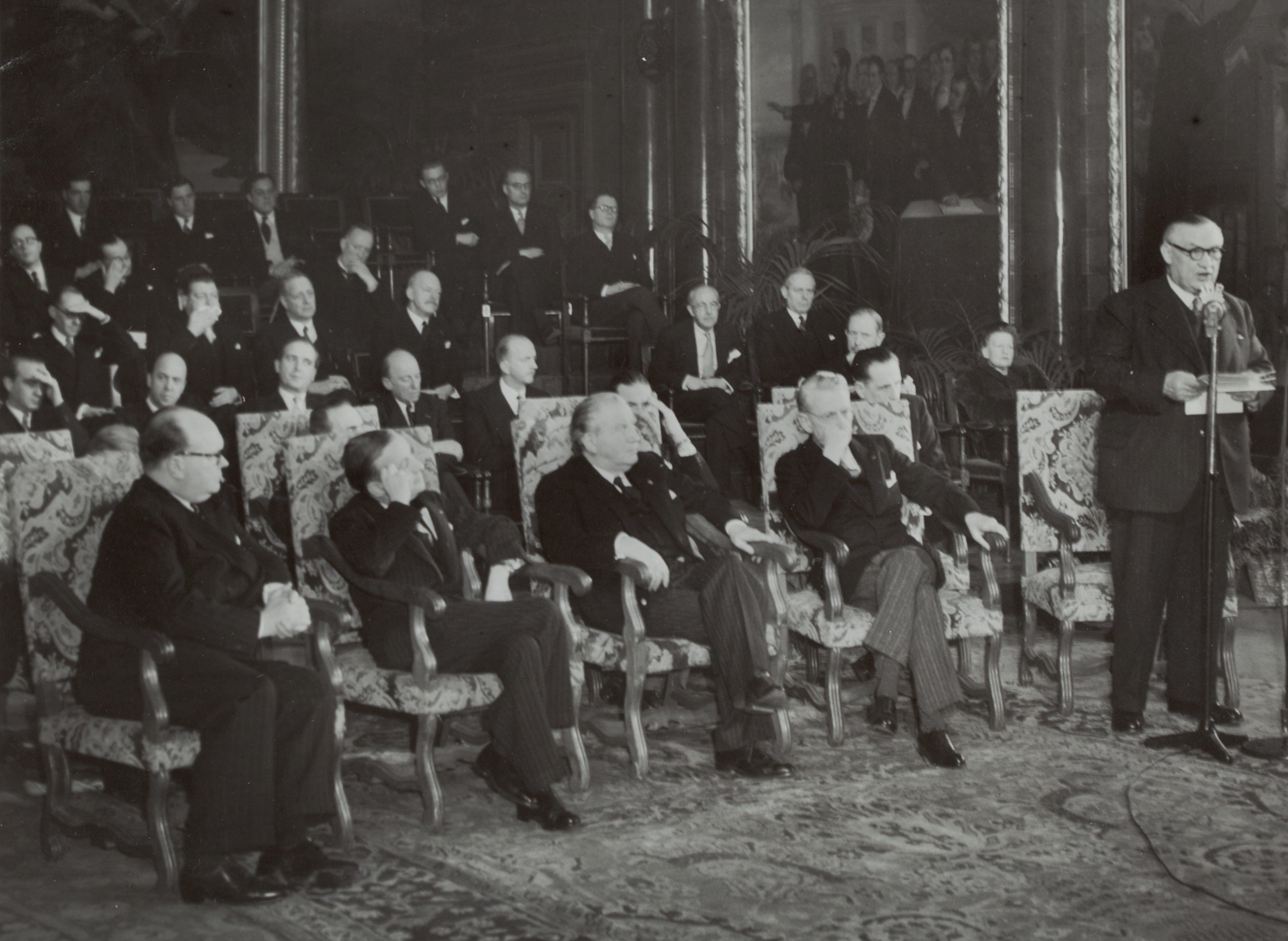 Collectie / Archief : Fotocollectie Rijksvoorlichtingsdienst Eigen Reportage / Serie : [ onbekend ] Beschrijving : ministers, verdragen, Bech, Bevin, Bidault, Boetzelaer van Datum : 17 februari 1948 Locatie : Brussel Trefwoorden : ministers, verdragen Persoonsnaam : Bech, Bevin, Bidault, Boetzelaer van Fotograaf : Fotograaf Onbekend / Anefo Auteursrechthebbende : Nationaal Archief Materiaalsoort : Foto (zwart/wit) Nummer archiefinventaris : bekijk toegang 2.24.10.02 Bestanddeelnummer : 136-0519